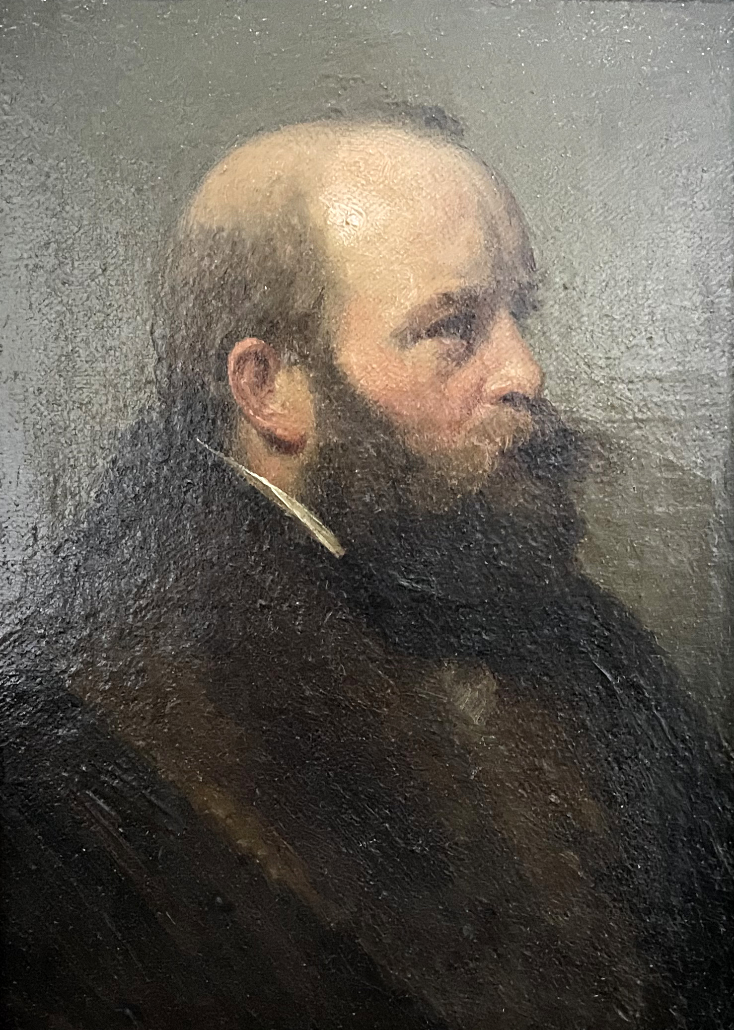 11 Gesellschap - Porträt Eduard Geselschap (1814–1878) - in Freundschaftsgalerie von Einzelbildnissen der Düsseldorfer Malerschüler und ihren Freunden (Vermächtnis des Künstlers)